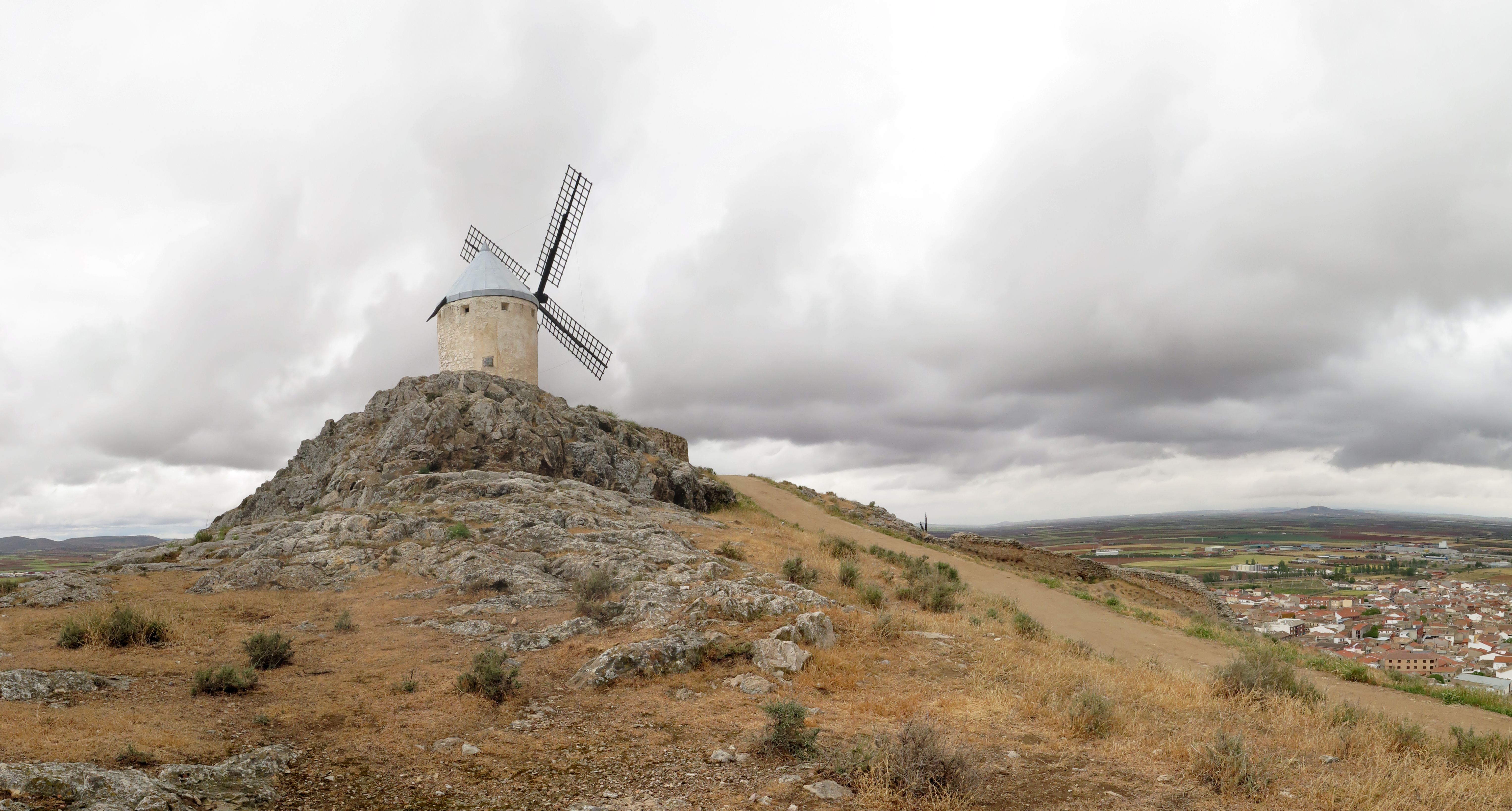 Uno de los molinos del alto del pueblo de Consuegra (provincia de Toledo), en Castilla-La Mancha (España).